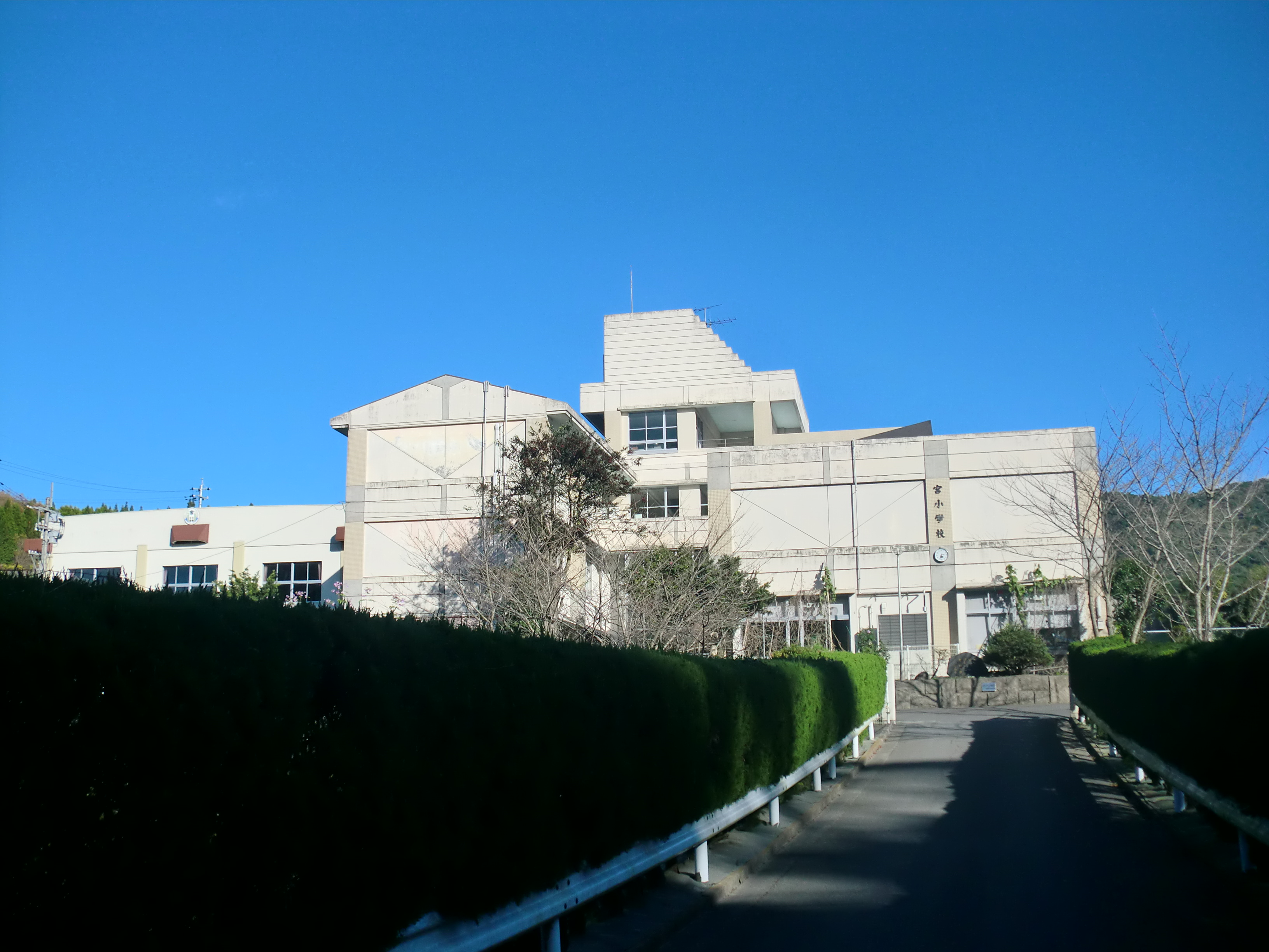 鹿児島市にある宮（みや）小学校